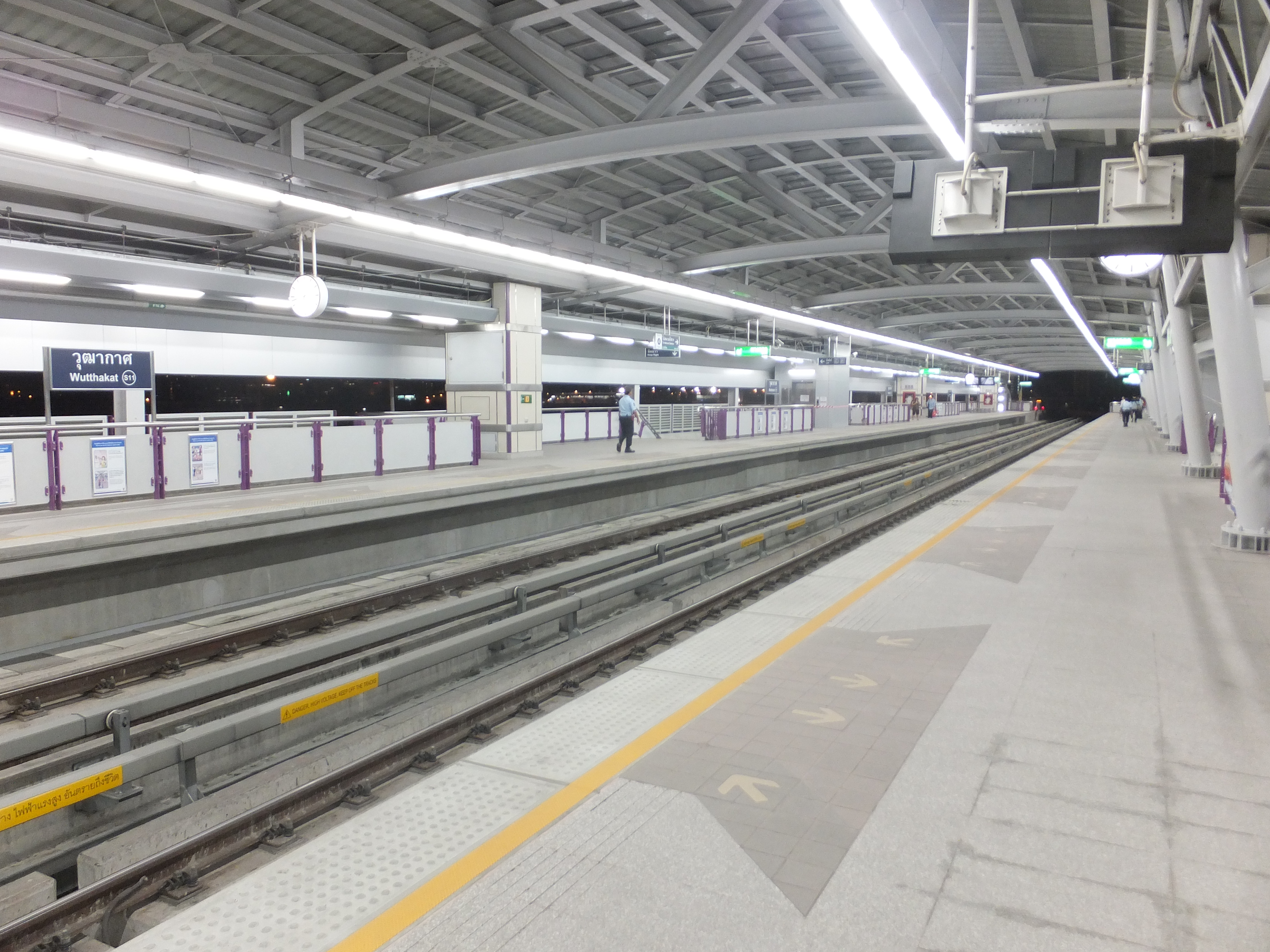 バンコクBTSウターカート駅のホーム。手前はバーンワー方面行きホーム。